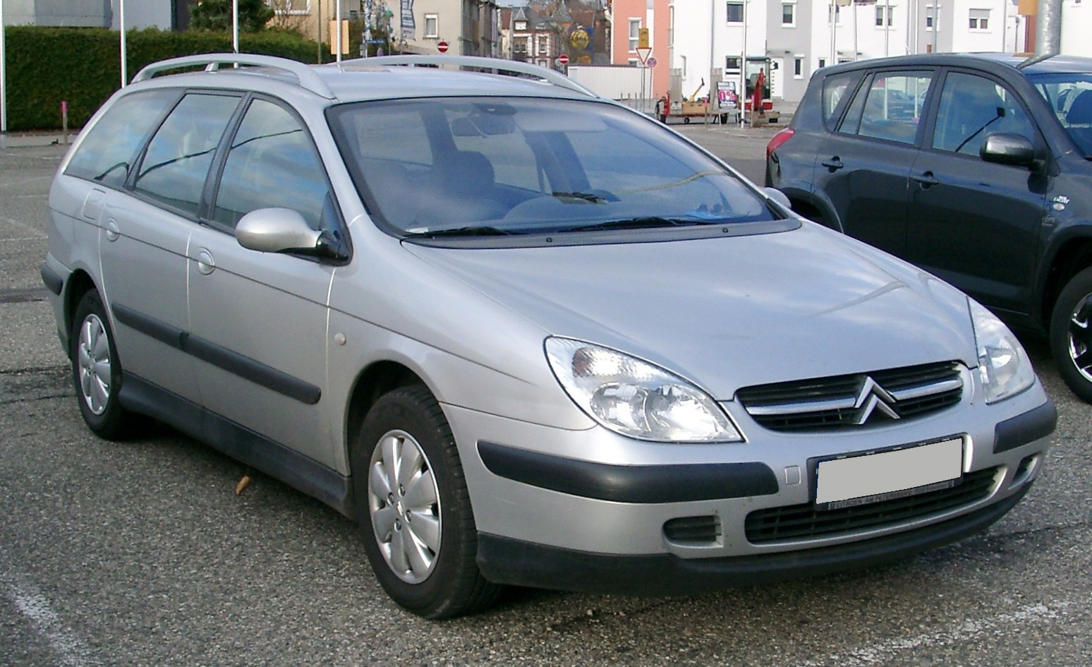 Citroen C5